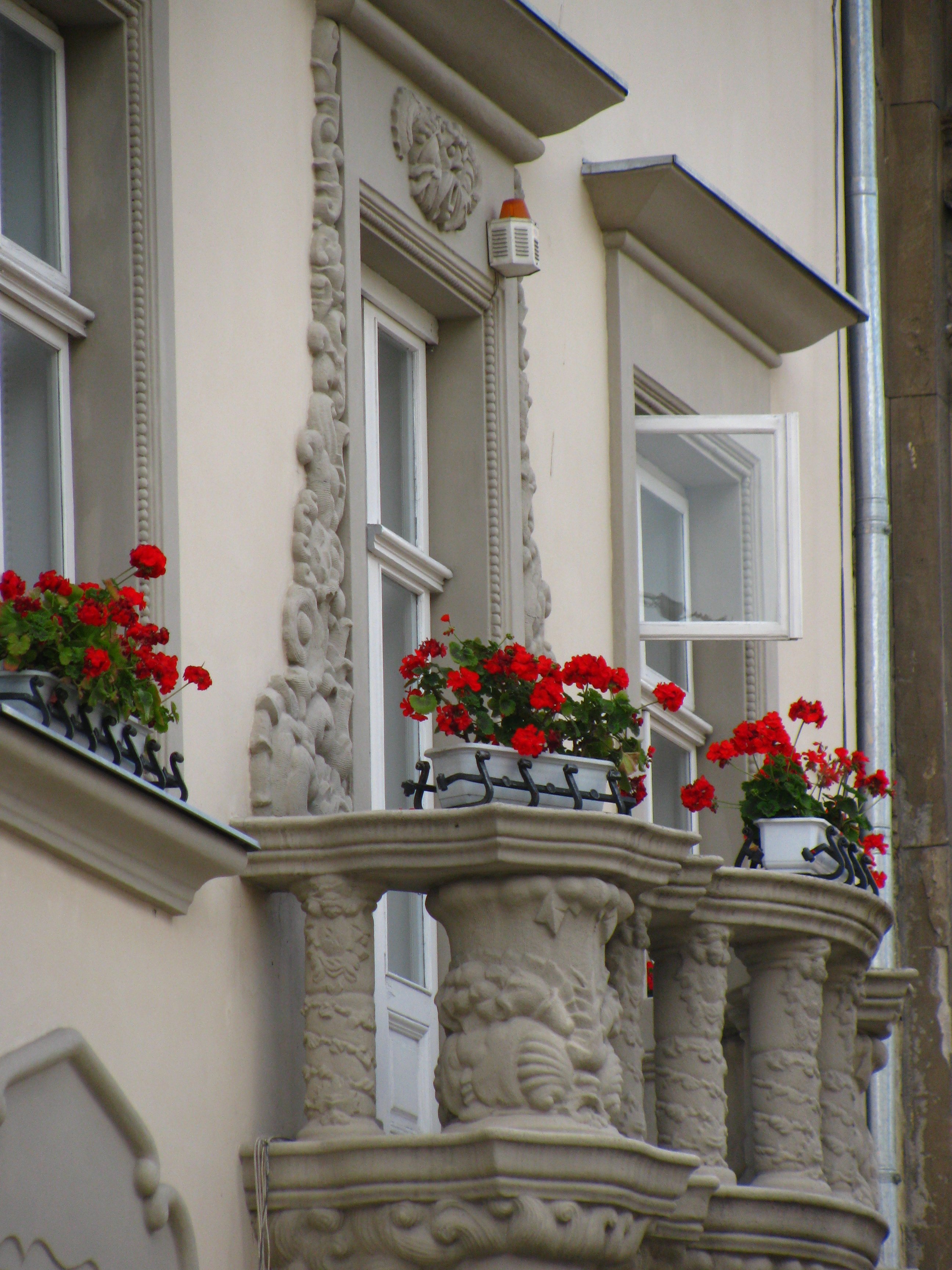 Балкон кам'яниці Мазанчівської